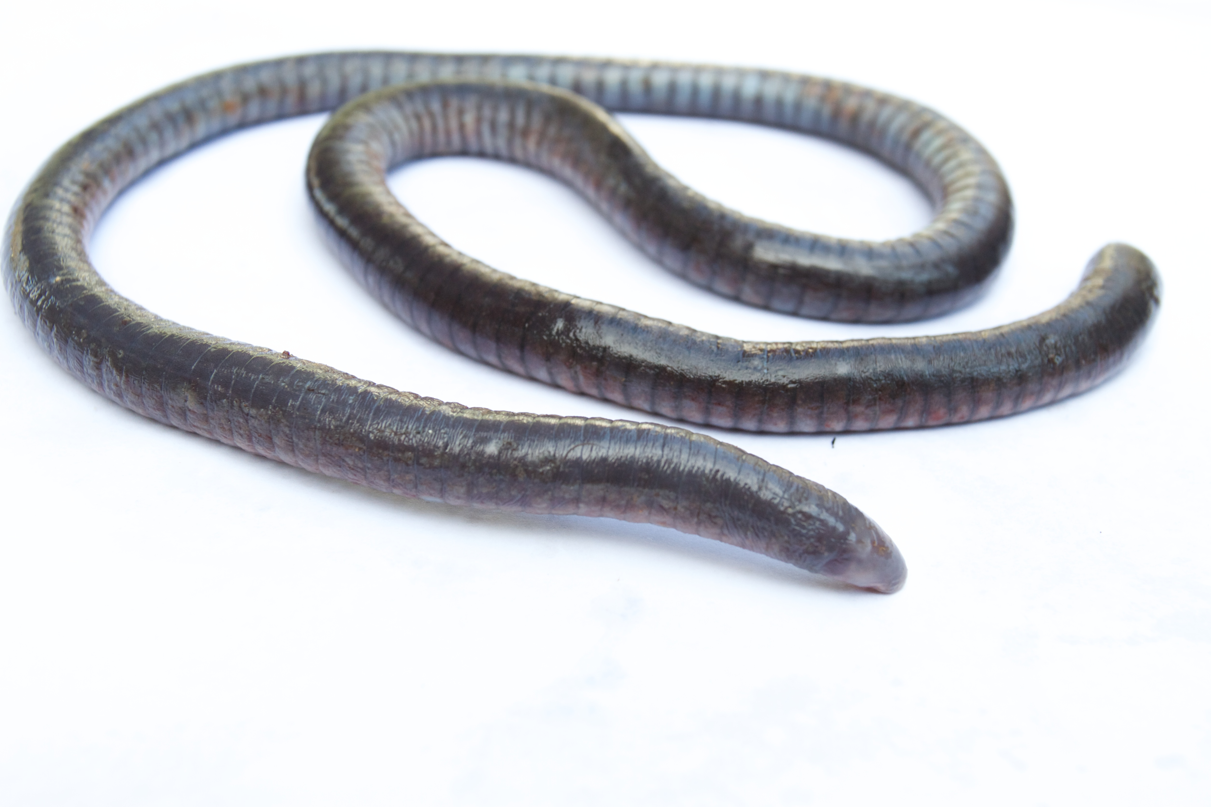 Oscaecilia ochrocephala